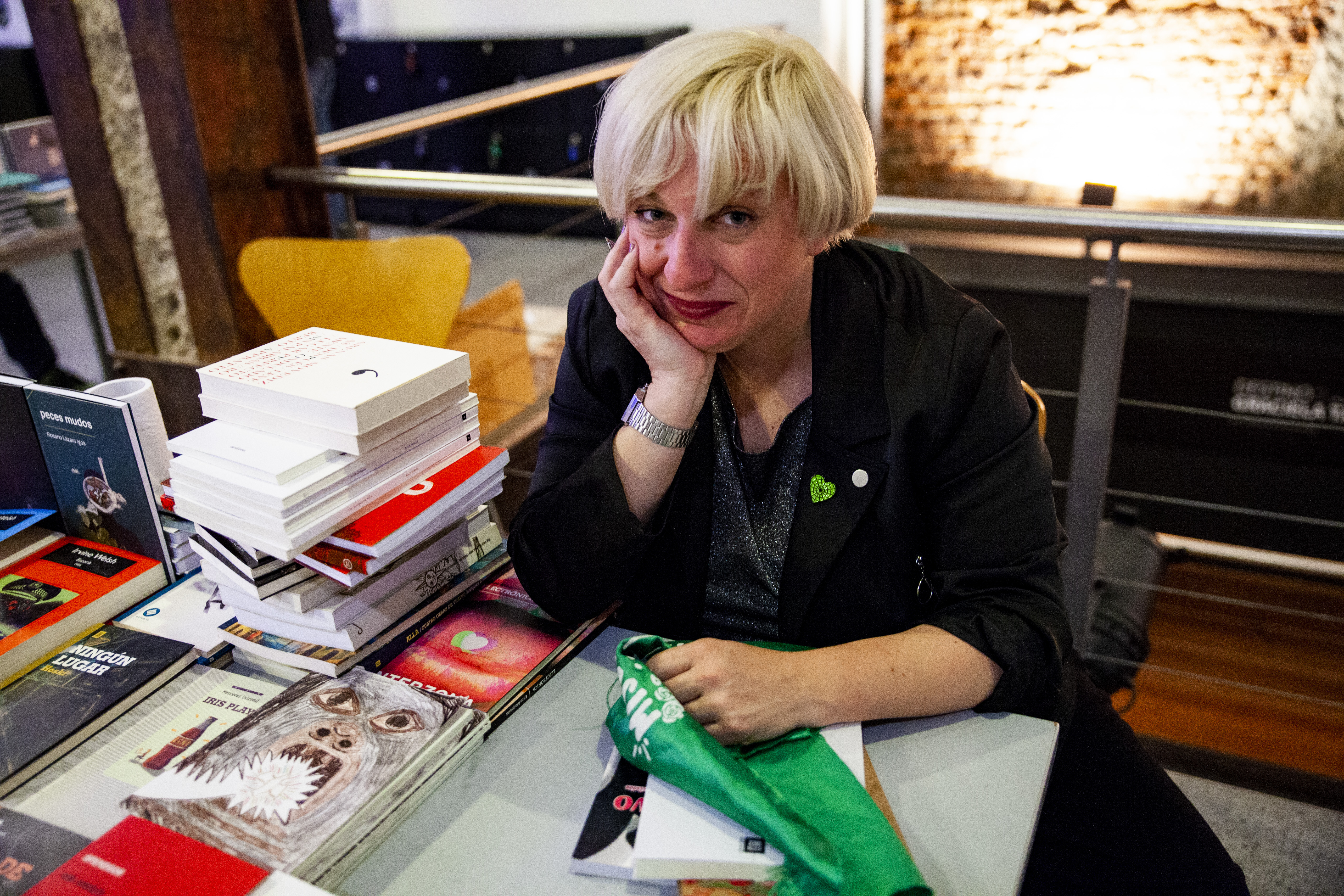 La escritora, locutora y periodista Gabriela Borrelli en el Festival Internacional de Literatura de Buenos Aires (FILBA). Montevideo, 2018.